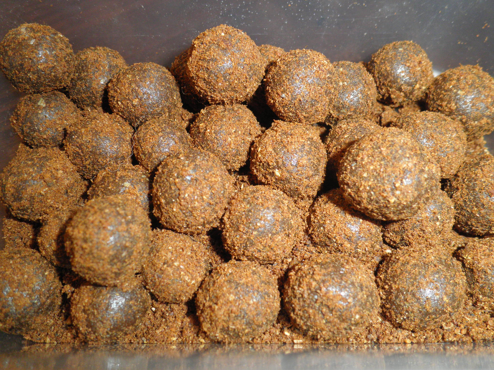 Рибальські бойли